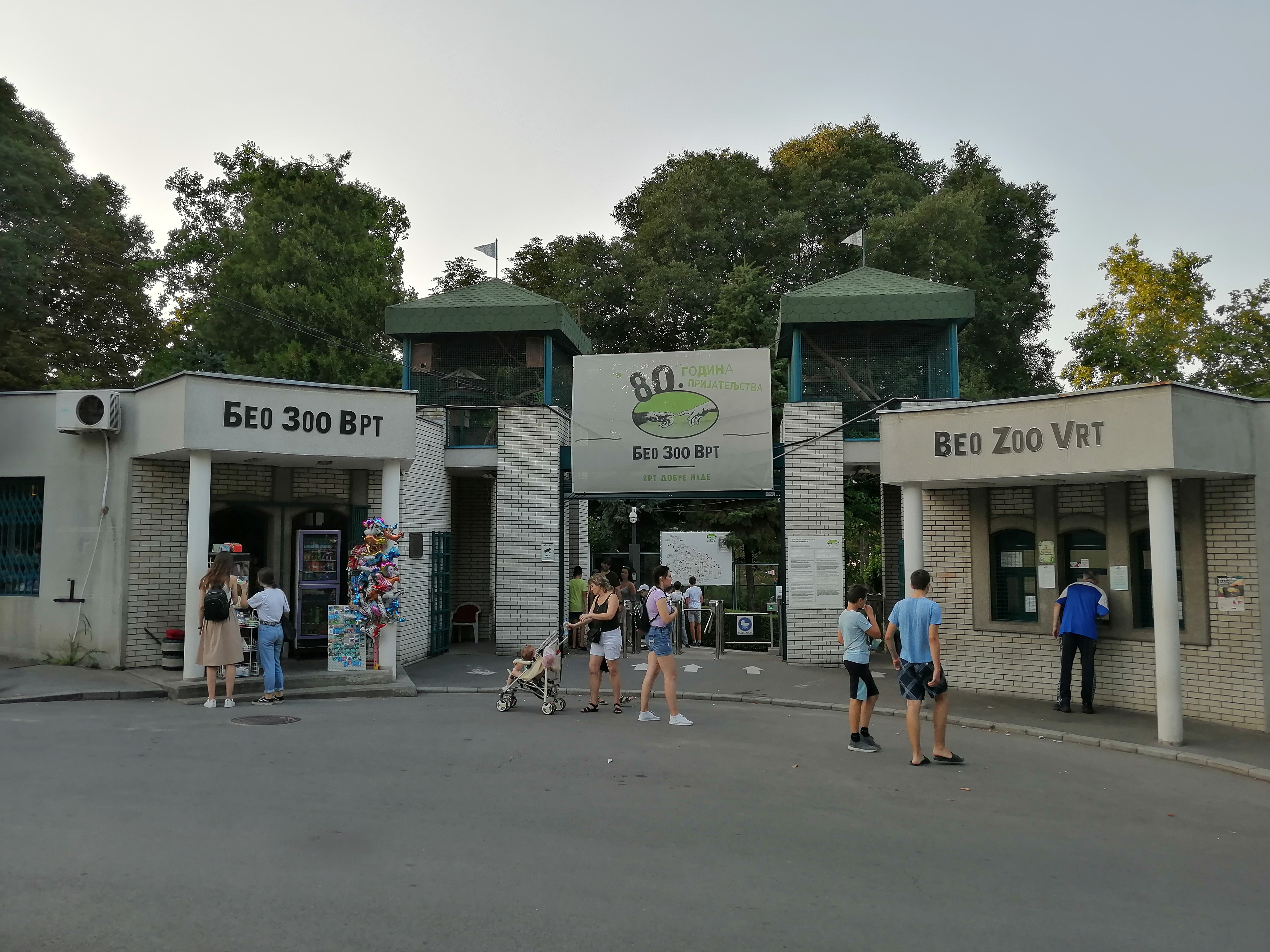 Zoo vrt Beograd